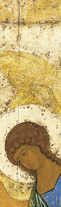 Икона Андрея Рублёва - Святая Троица